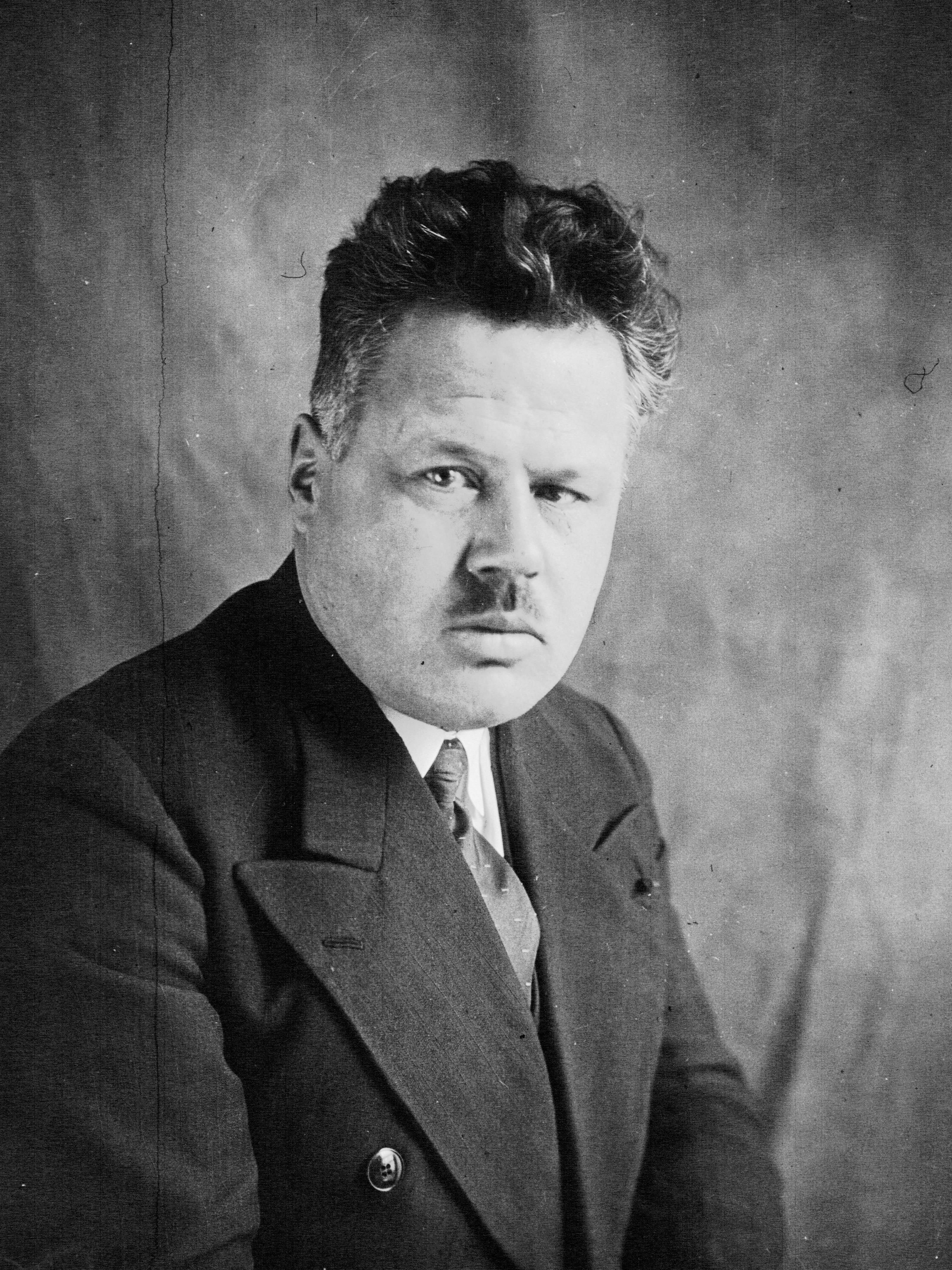 Henri Maupoil, député de Saône et Loire [photographie de presse]